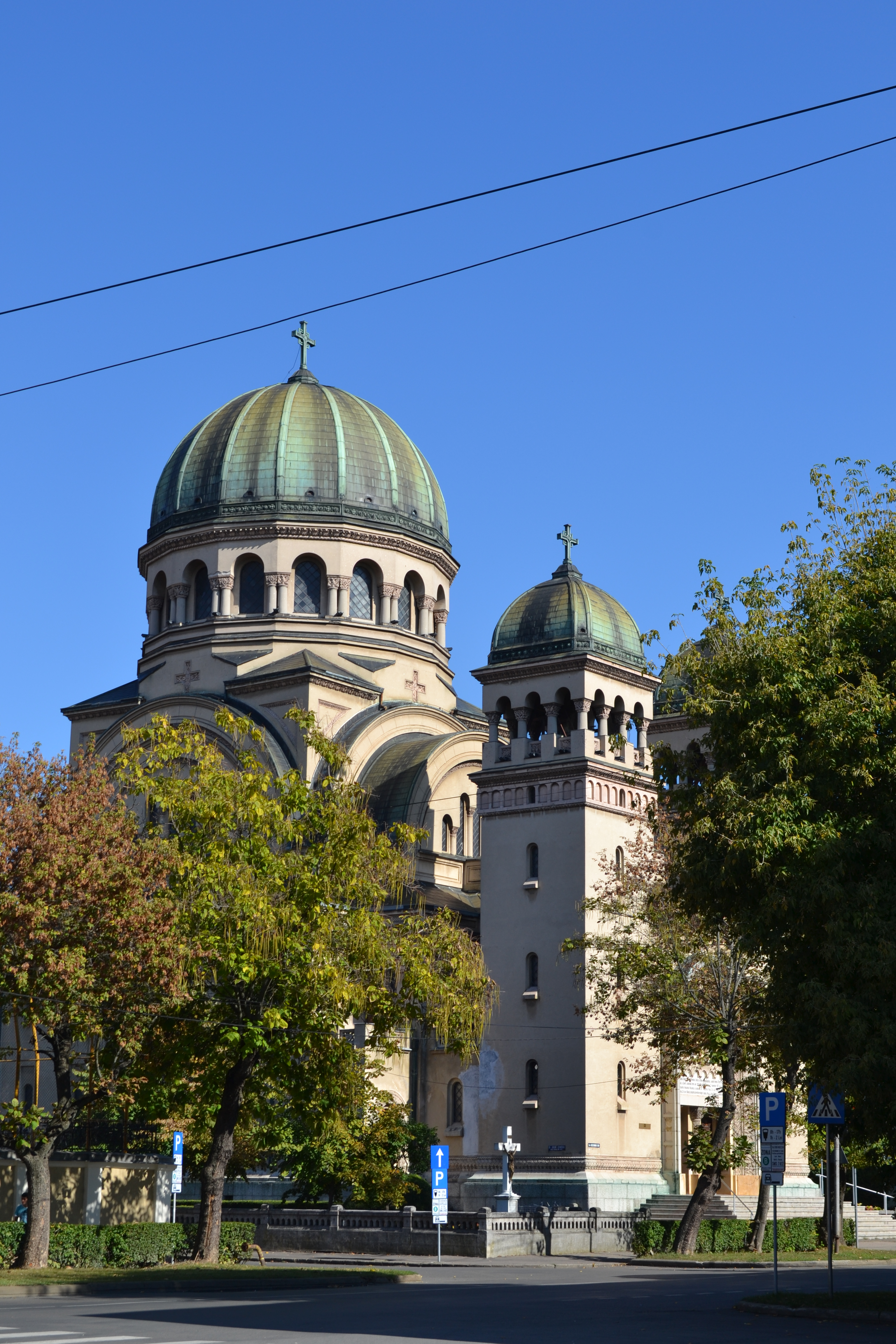 Biserica Sfintii Arhangheli Mihail si Gavriil Satu Mare